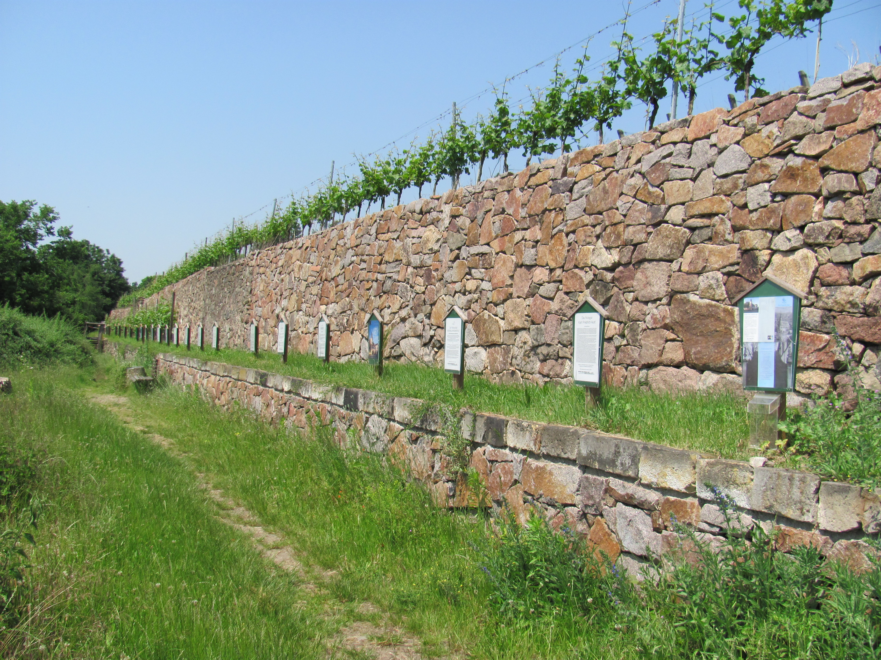 Radebeul Zechsteinweg Weinlehrpfad